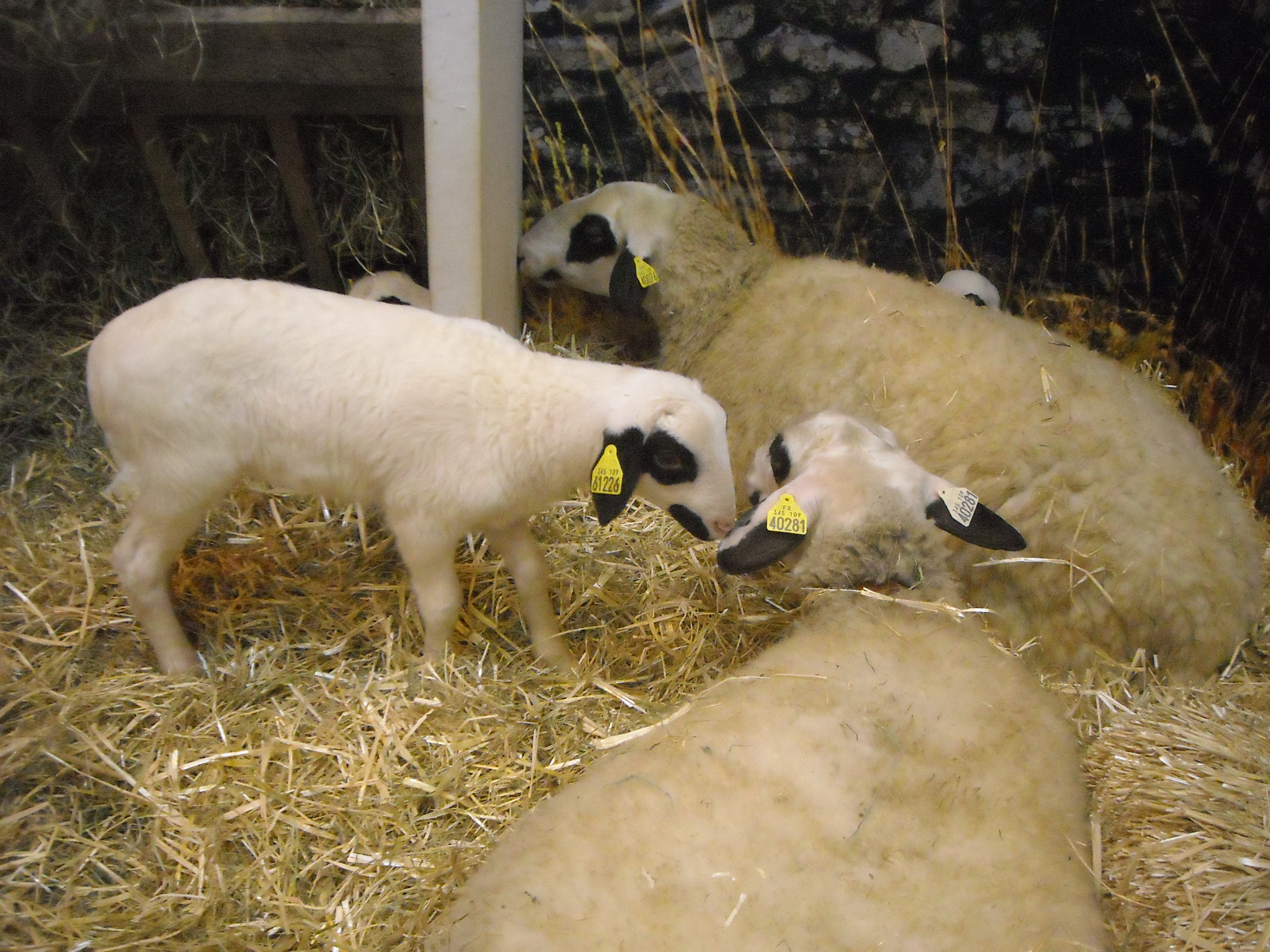 Brebis et agneau Causse du Lot au Salon International de l'agriculture, Paris, Porte de Versailles, France